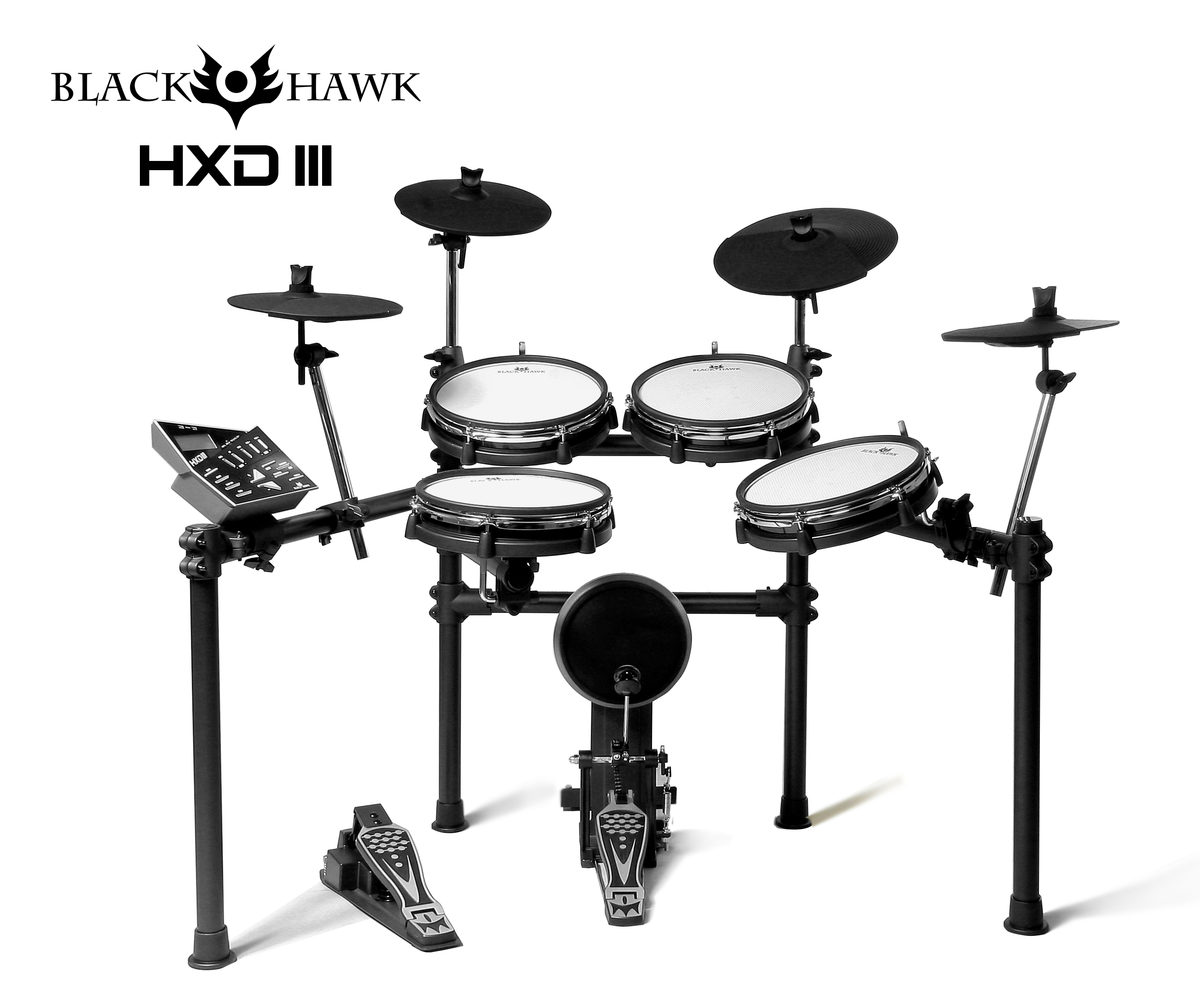 Perkusja elektroniczna z padami siatkowymi